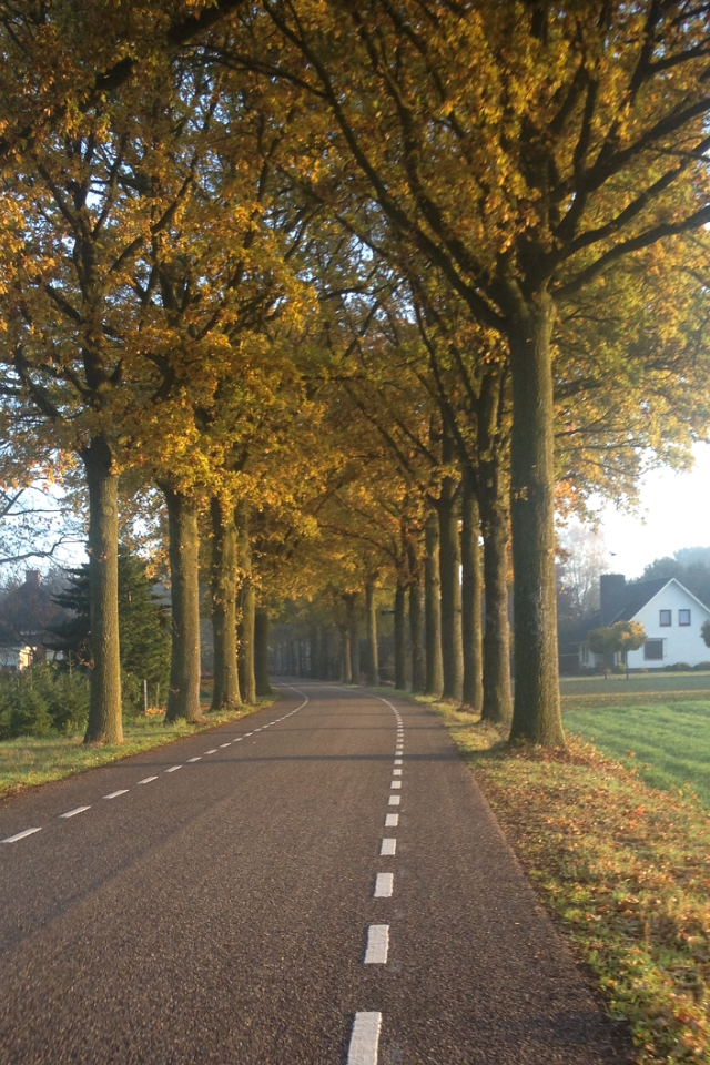 Foto van de eiken aan de Peelkant in Sint Anthonis tijdens de herfst van 2017.